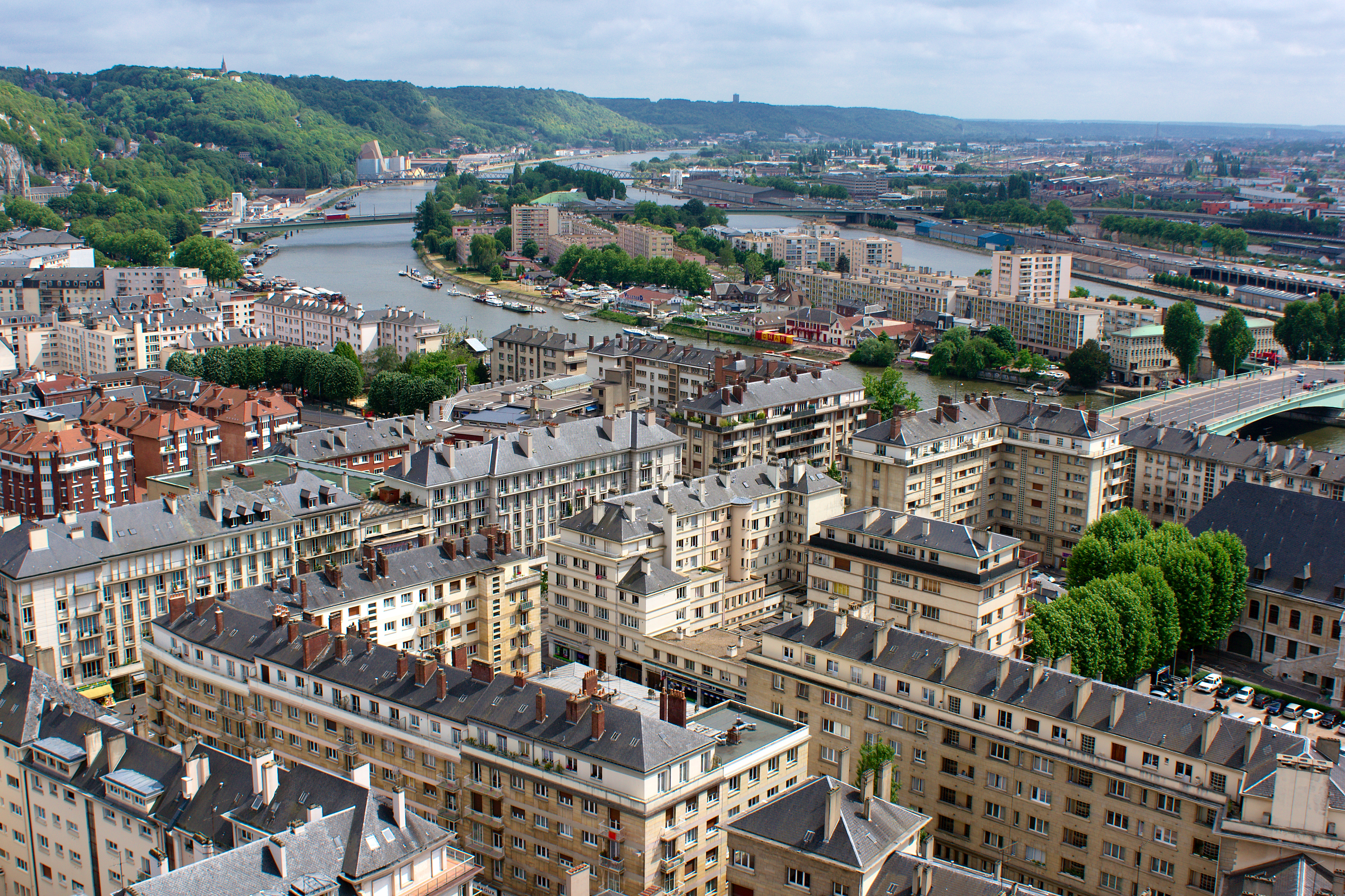 Vue de Rouen depuis la cathédrale Notre-Dame de Rouen en direction de la rue de la République, du pont Corneille et de l’île Lacroix